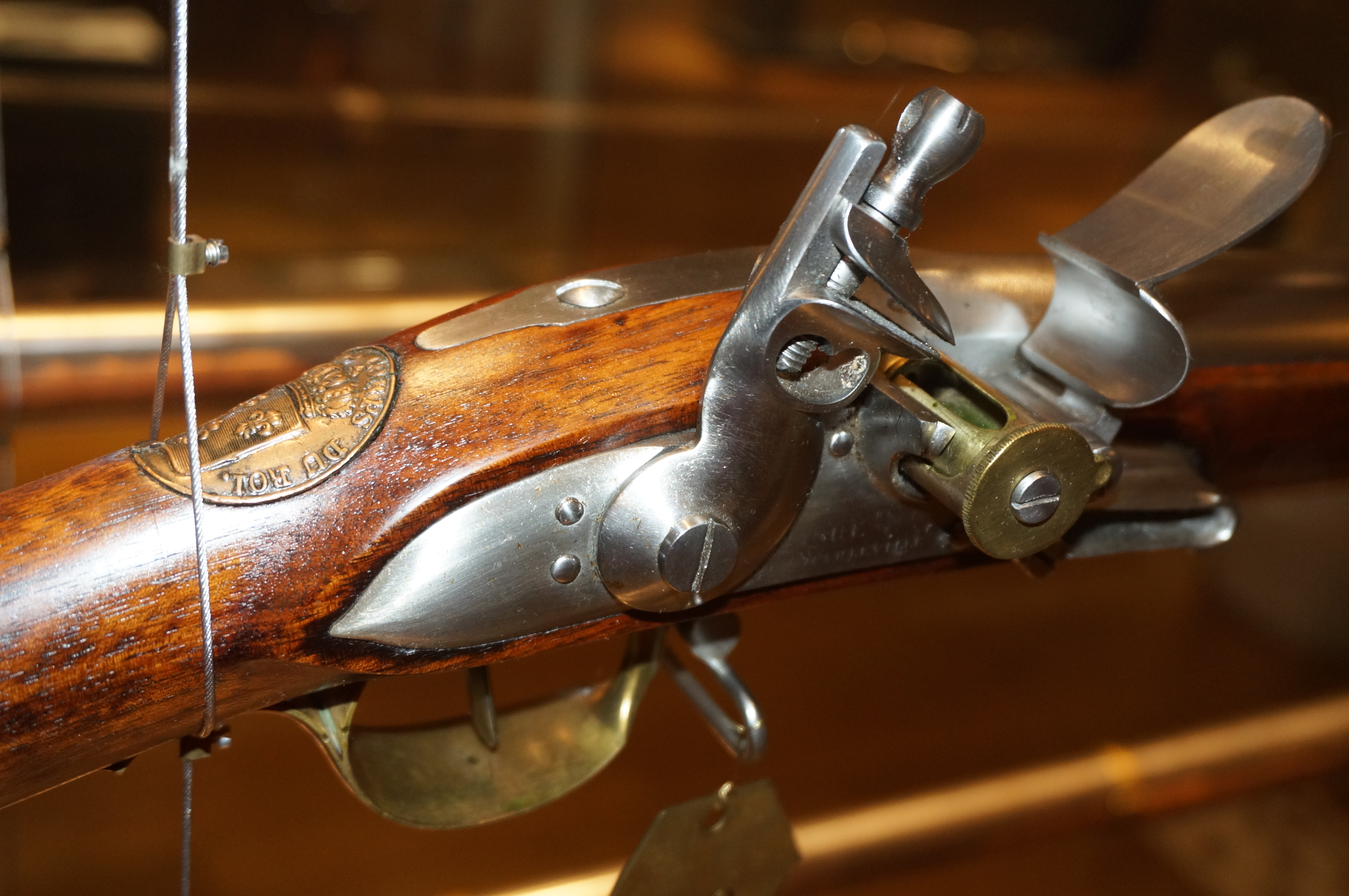 Présenté au musée de l'Ardenne .